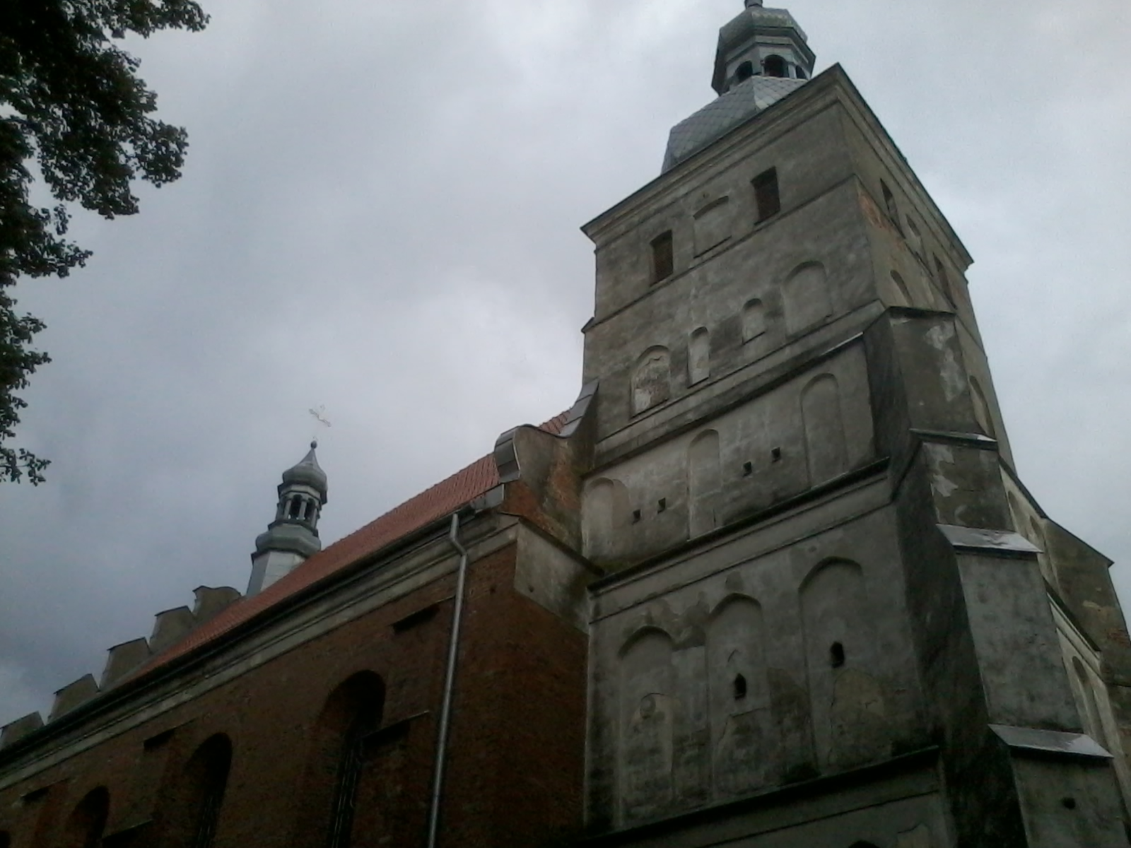 Kościół Wszystkich Świętych i św. Hieronima w Raciążku